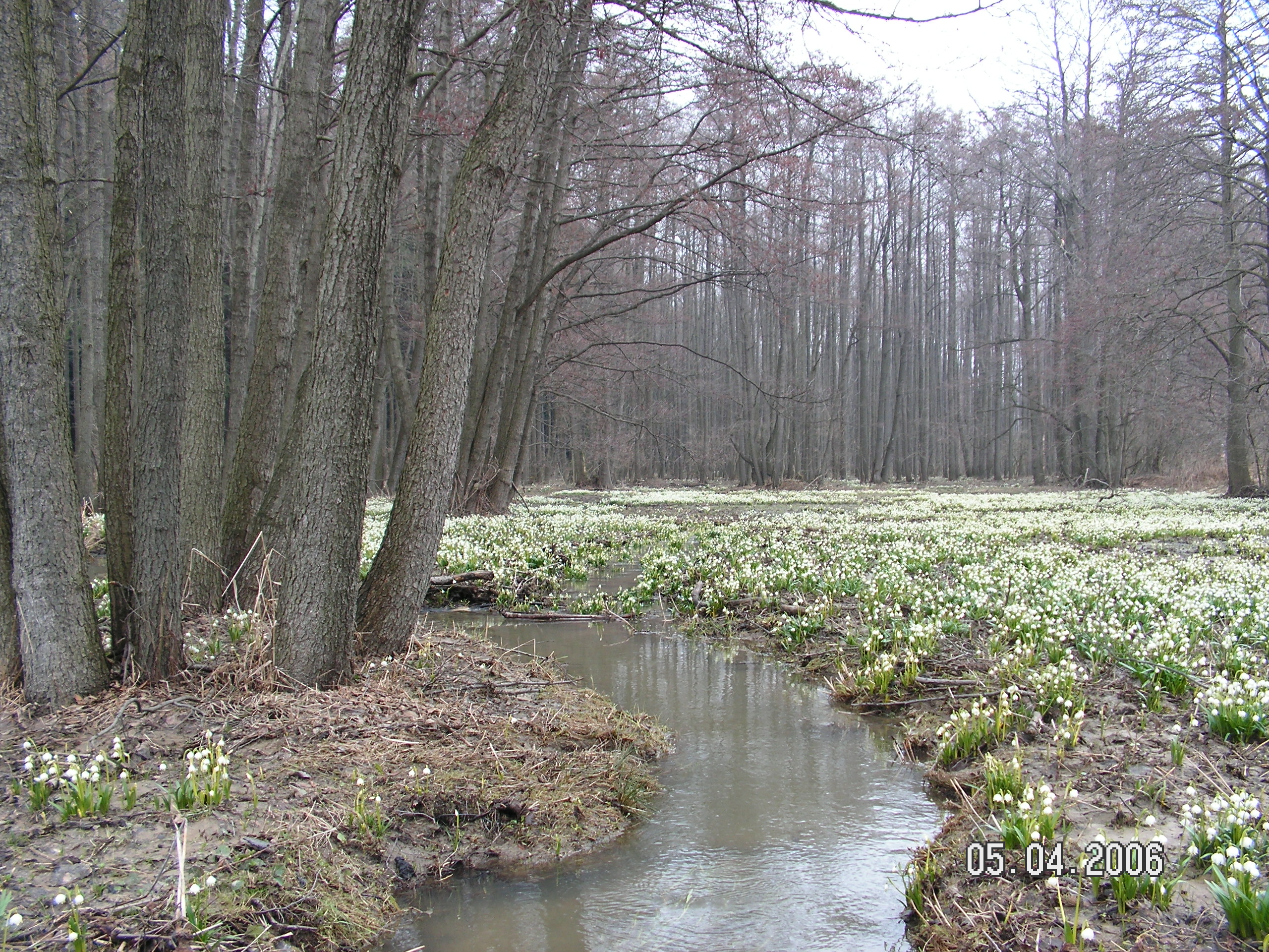 Potok Leština protékající Hroznětínskou loukou, která je známá masivním výskytem bledule jarní (Leucojum vernum).